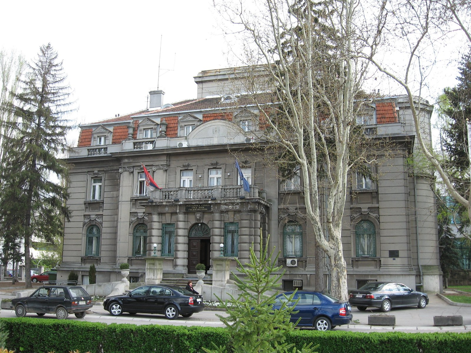 Зграда председништва СО Ниш. Снимљено априла 2010. године. Licensing